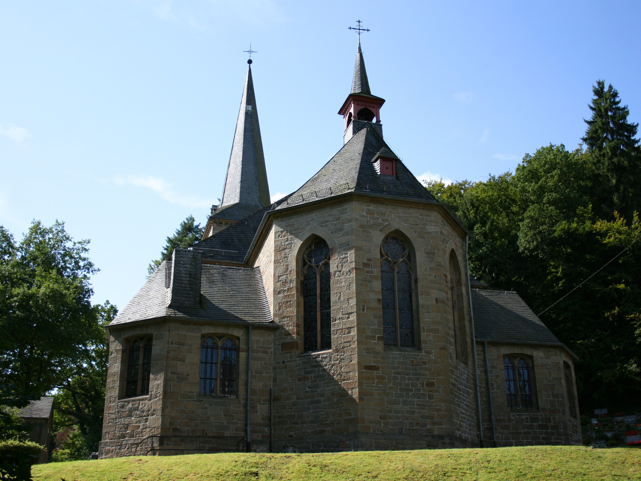 Sankt Johann Baptist in Marienheide-Gimborn